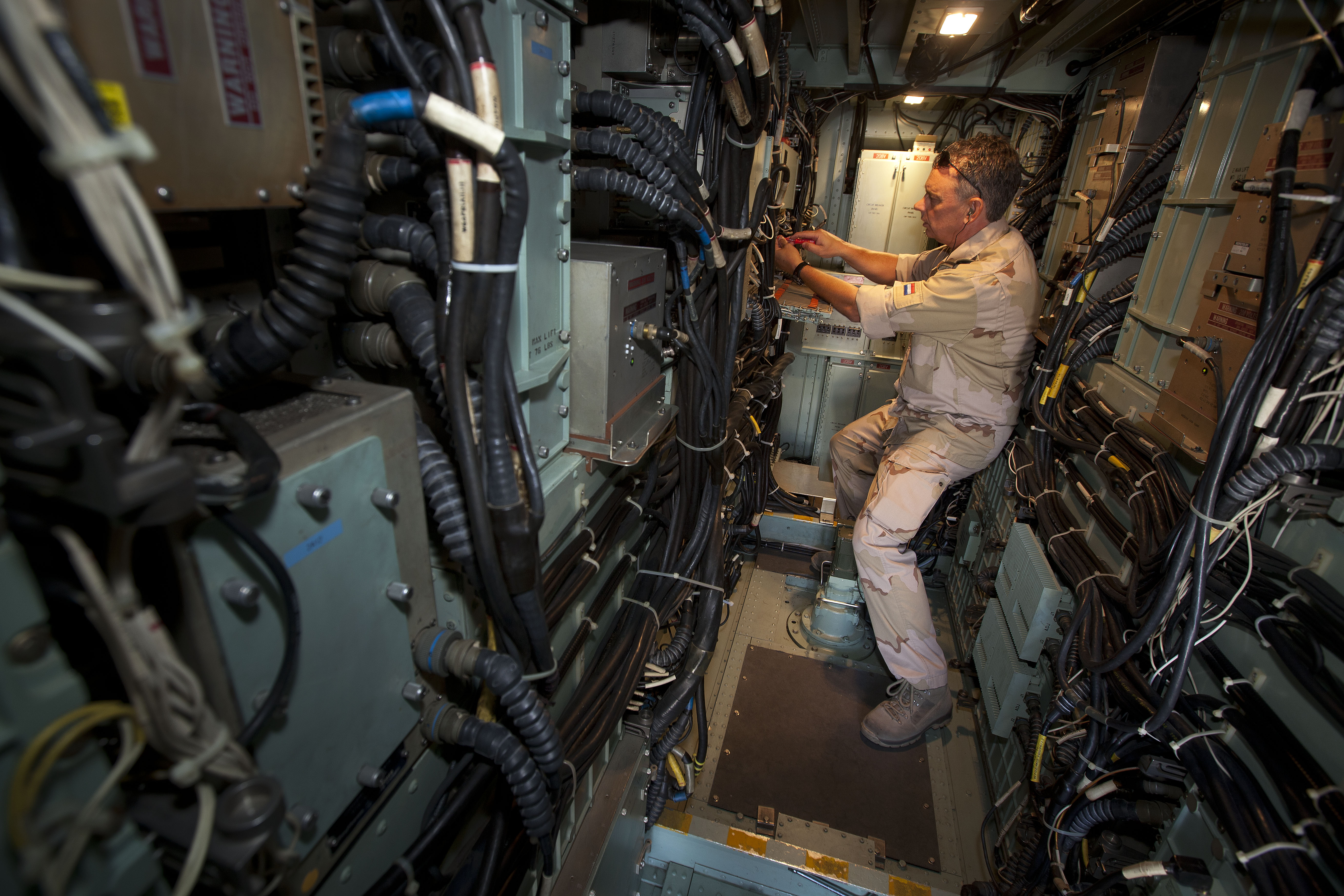 Turkije, Adana, Incirlik airbase, 27 september 2013. Lucht-en landmachtpersoneel van het Defensie Grondgebonden Luchtverdedigings Commando (DGLC) participeert in de patriotmissie 'Active Fence' ter bescherming van het zuiden van Turkije. 1 (NL) TBMTF beschermt de stad Adana.